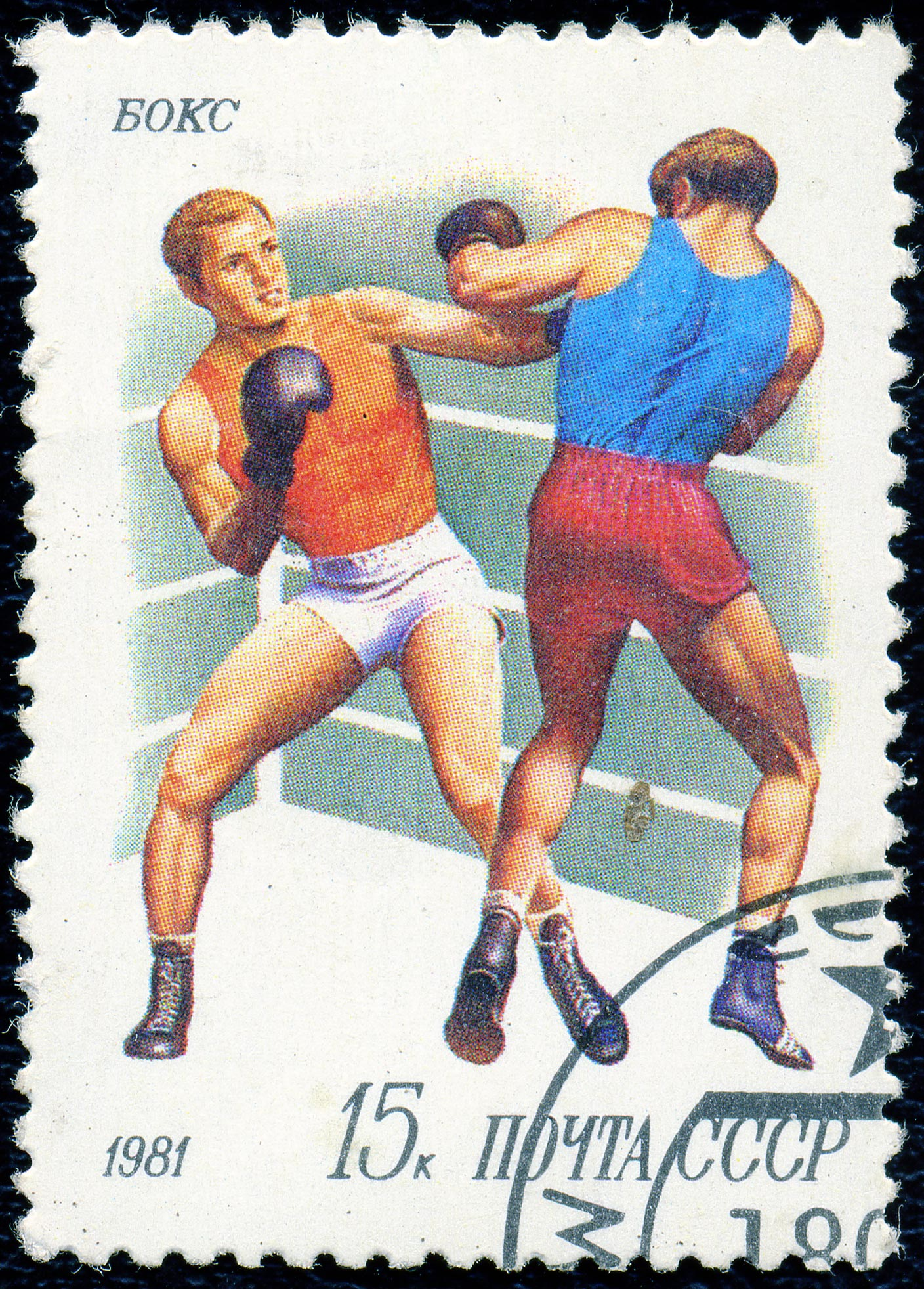 Почтовая марка СССР. 1981. Бокс